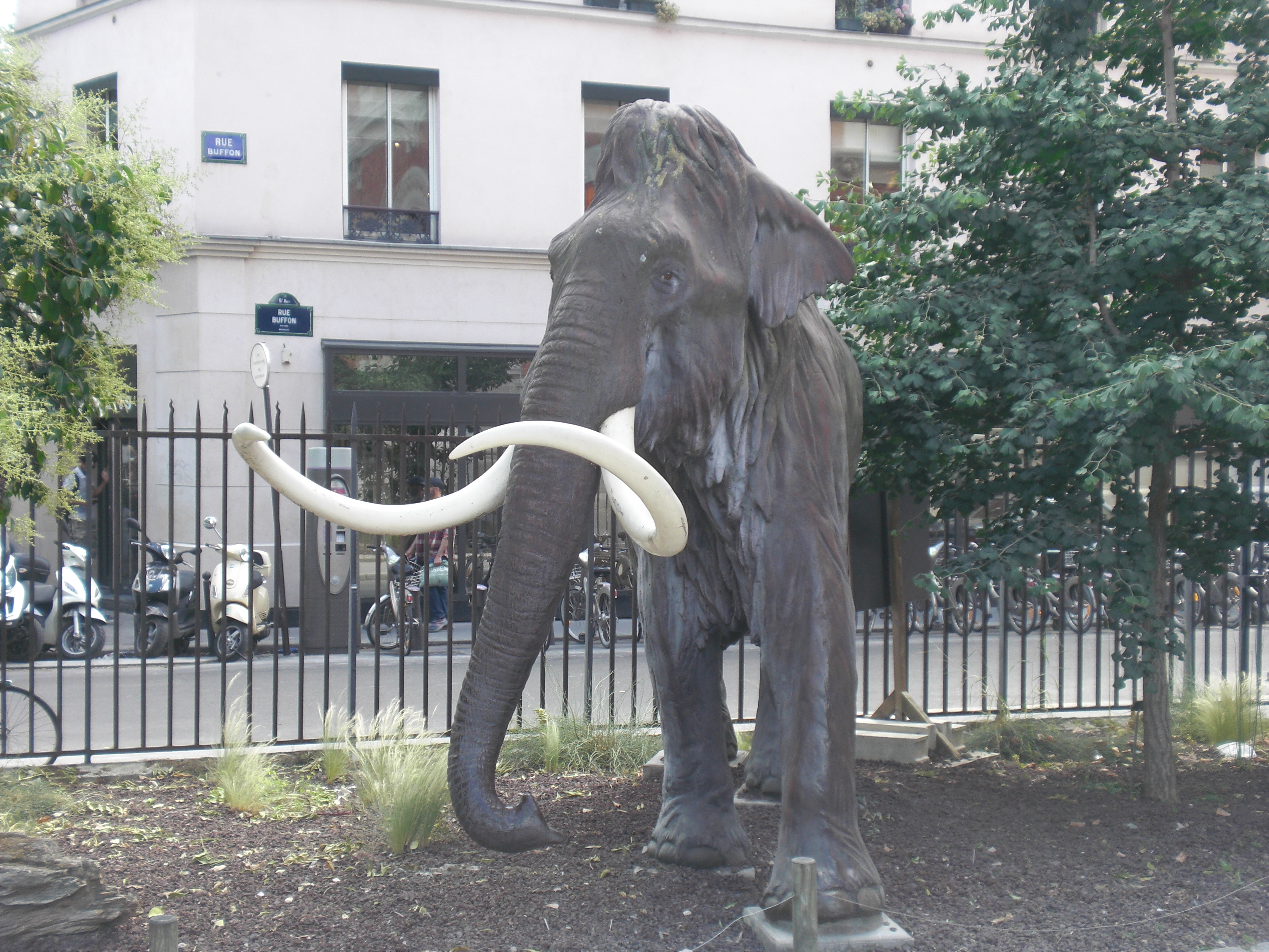 Mamuto en Parizo